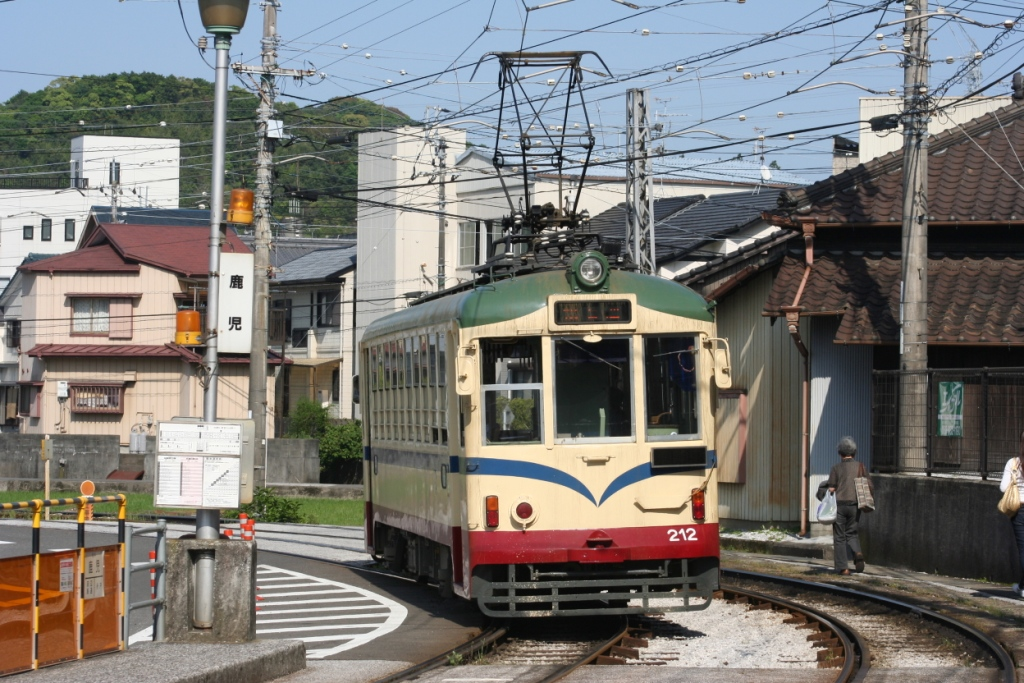 鹿児電停に進入する電車